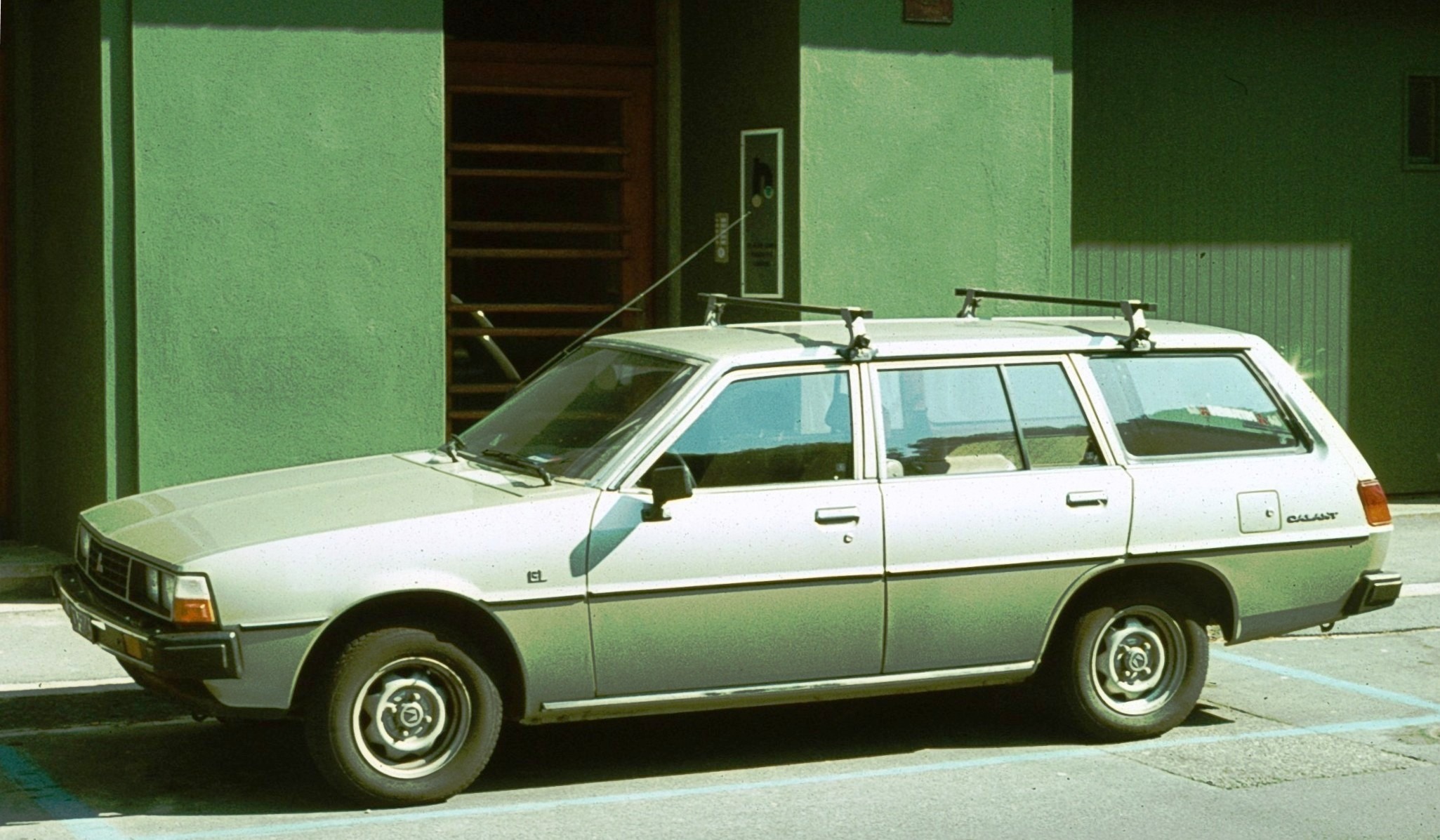 Mitsubishi Galant Estate